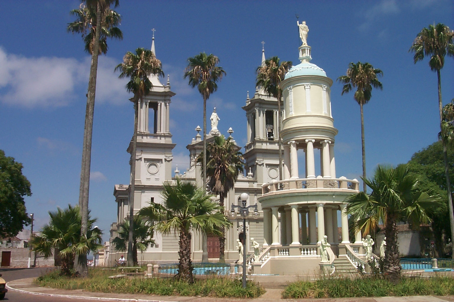 Catedral Noss Senhora da Conceição e Château d'Eau, em Cachoeira do Sul